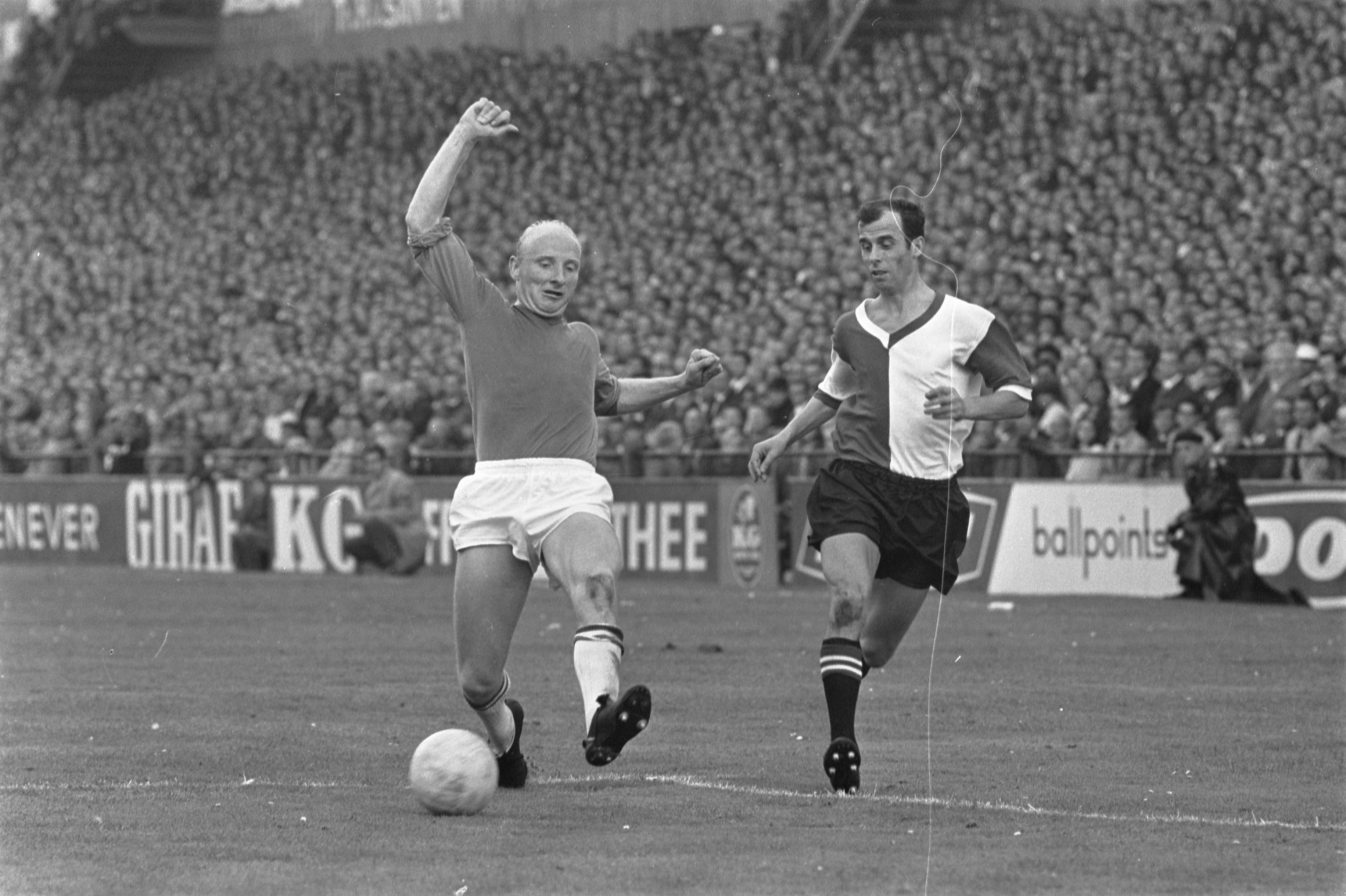 Collectie / Archief : Fotocollectie Anefo Reportage / Serie : ADO-Feyenoord: 2-3 Beschrijving : Coen Moulijn (rechts) in duel met Theo van der Burch Datum : 22 september 1968 Locatie : Den Haag, Zuid-Holland Trefwoorden : sport, voetbal Persoonsnaam : Burch, Theo van der, Moulijn, Coen Fotograaf : Fotograaf Onbekend / Anefo Auteursrechthebbende : Nationaal Archief Materiaalsoort : Negatief (zwart/wit) Nummer archiefinventaris : bekijk toegang 2.24.01.05 Bestanddeelnummer : 921-7028